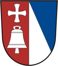 Petrůvky